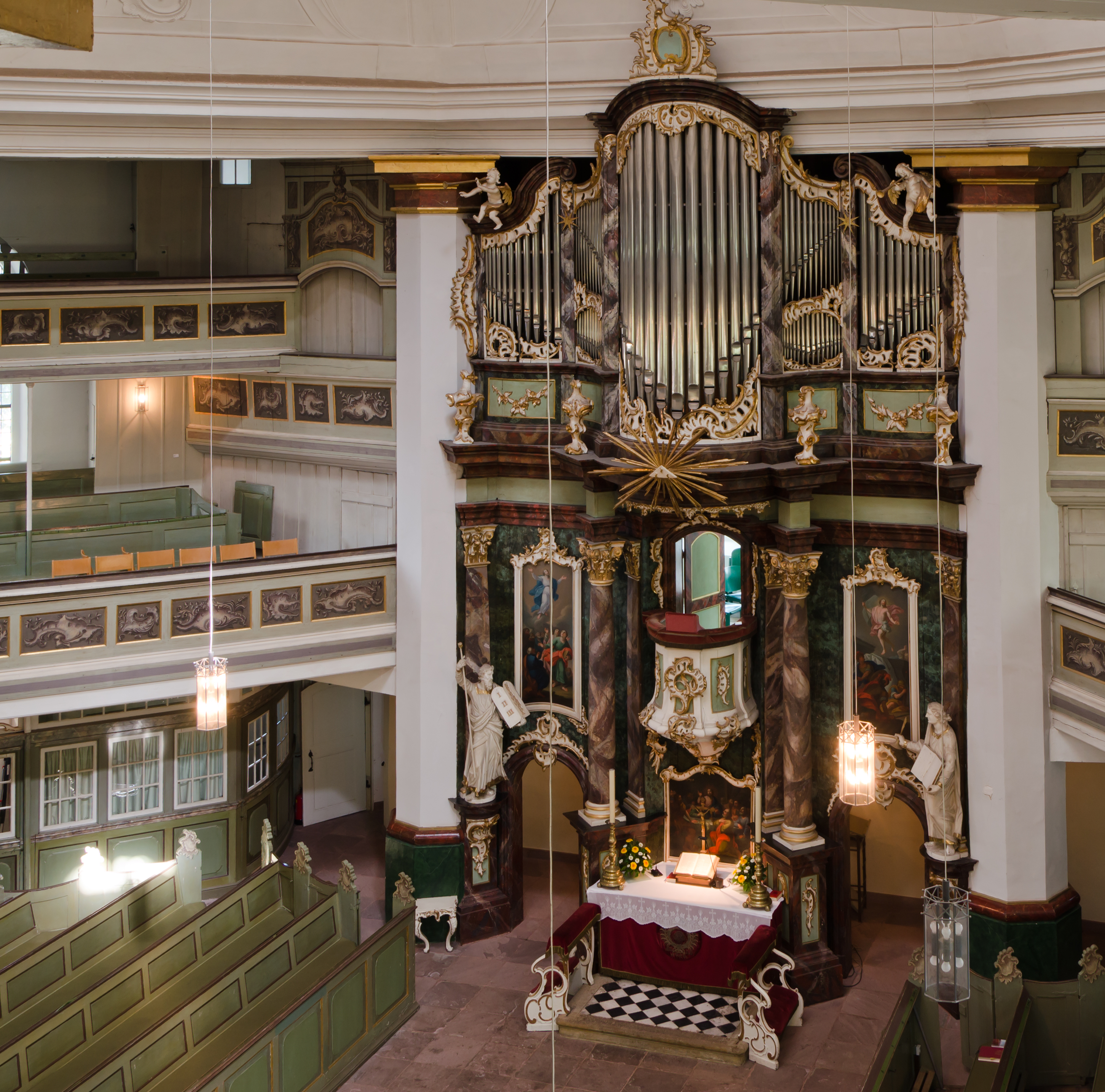 Rellinger Kirche - Blick von der zweiten Empore